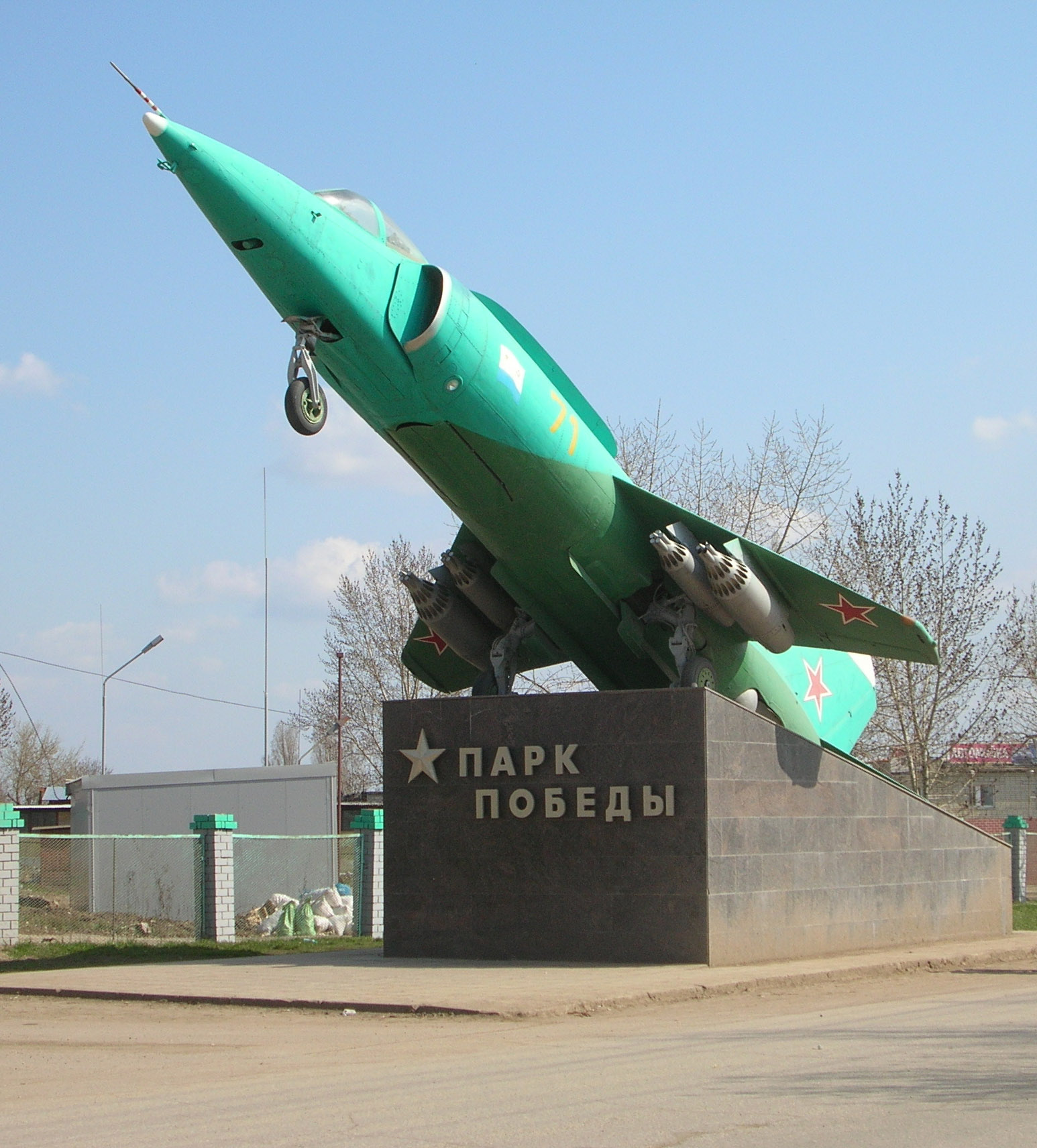 Самолёт вертикального взлёта и посадки Як-38. Экспонат Саратовского государственного музея боевой славы на территории Парка Победы, г. Саратов.